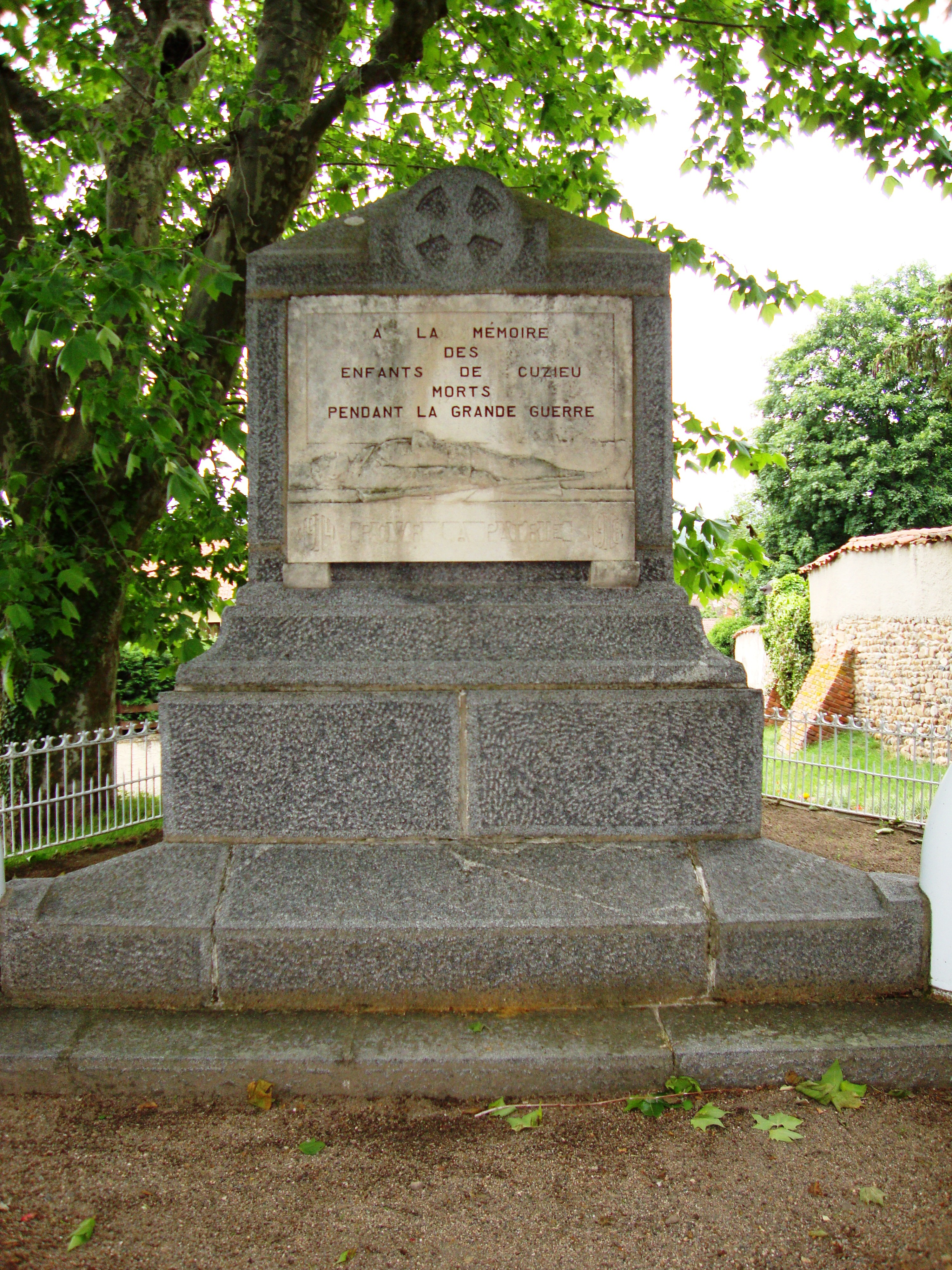 Cuzieu (Loire, Fr) monument aux morts